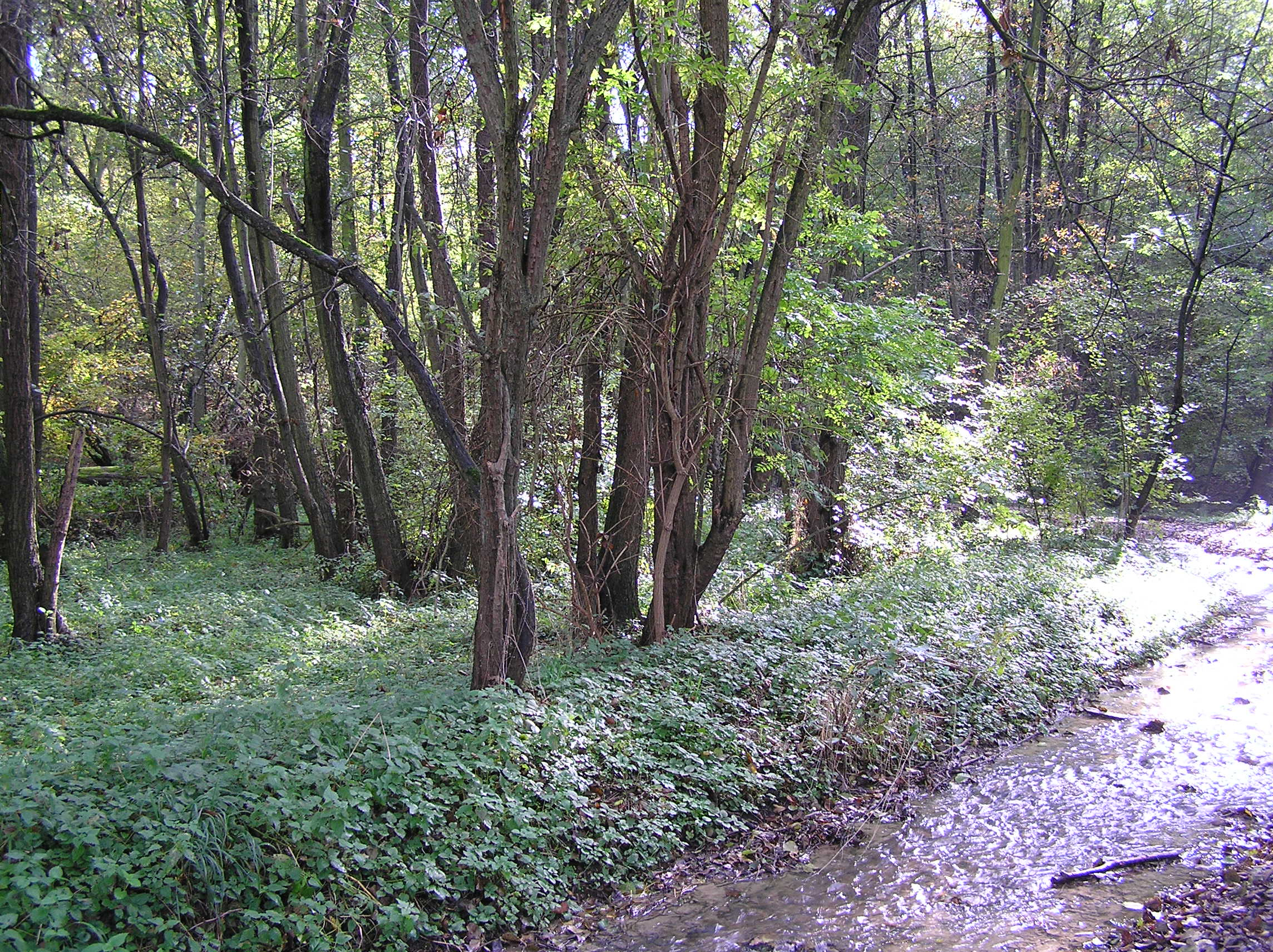 Elzenbronbos op puinwaaier in het Bunderbos.